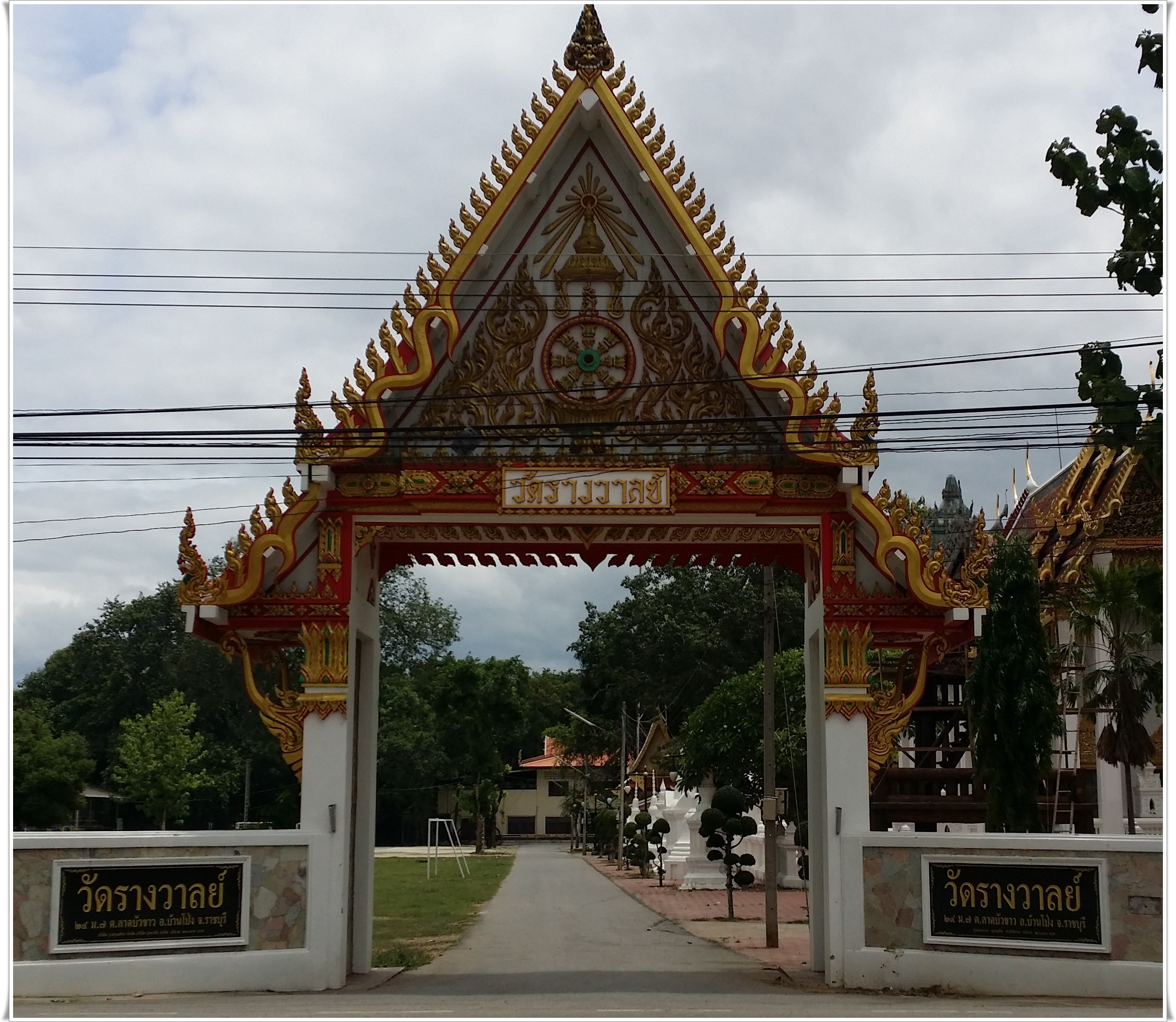 ซุ้มประตูวัดรางวาลย์